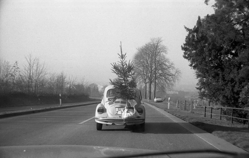 Adventszeit in Bonn